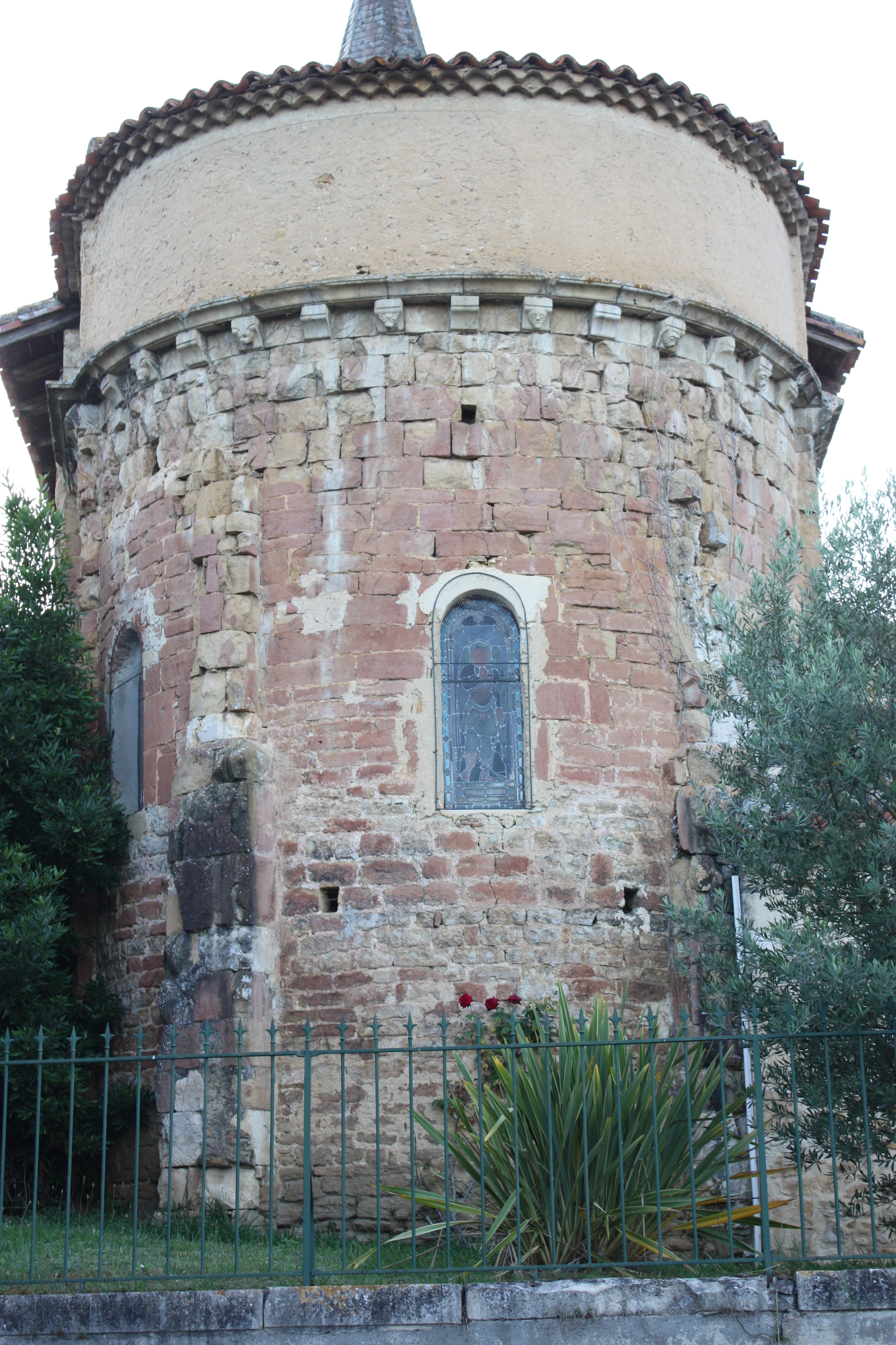 Le Fréchet - Eglise Notre-Dame